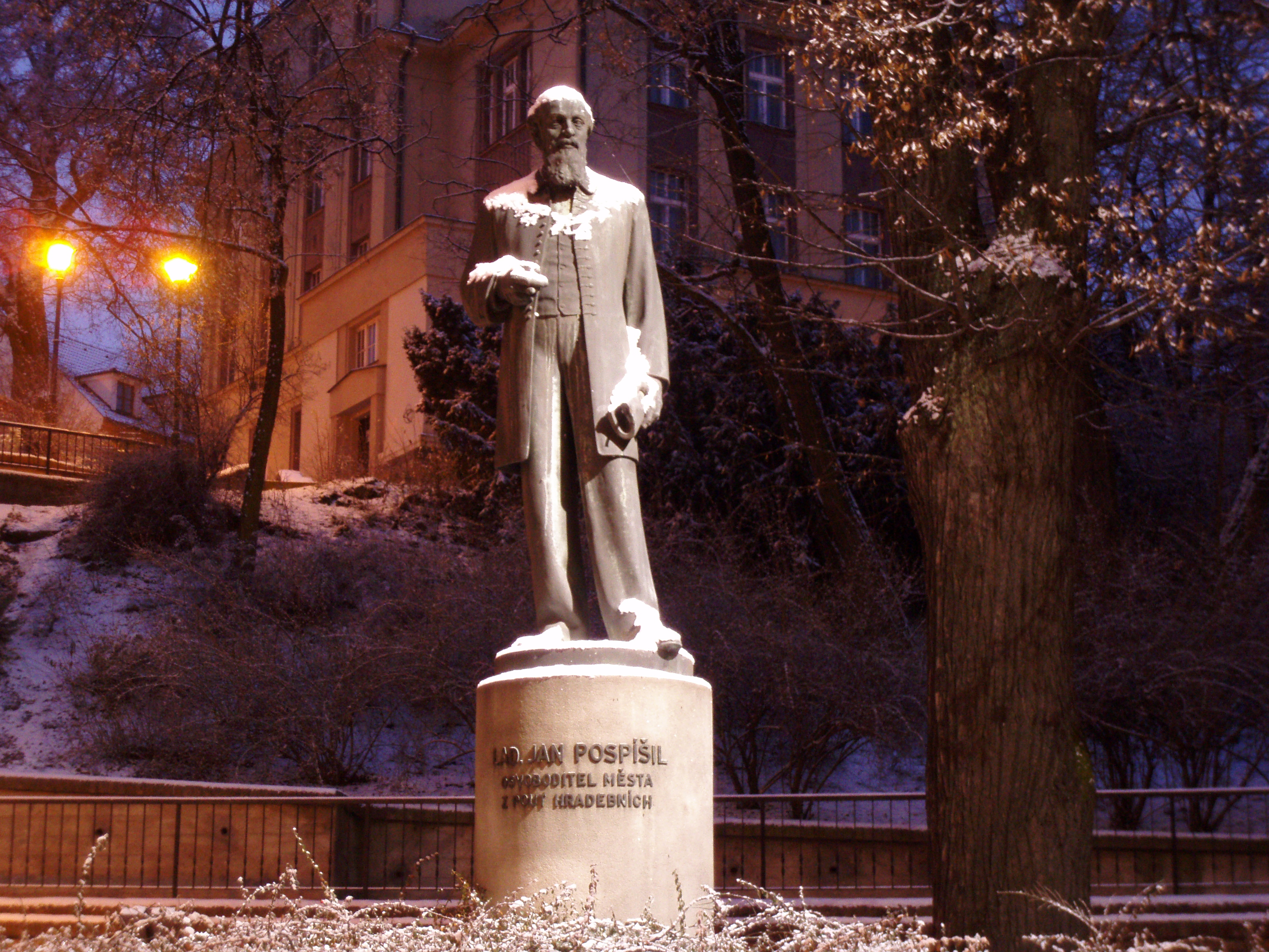 Pomník L. J. Pospíšila (Hradec Králové)